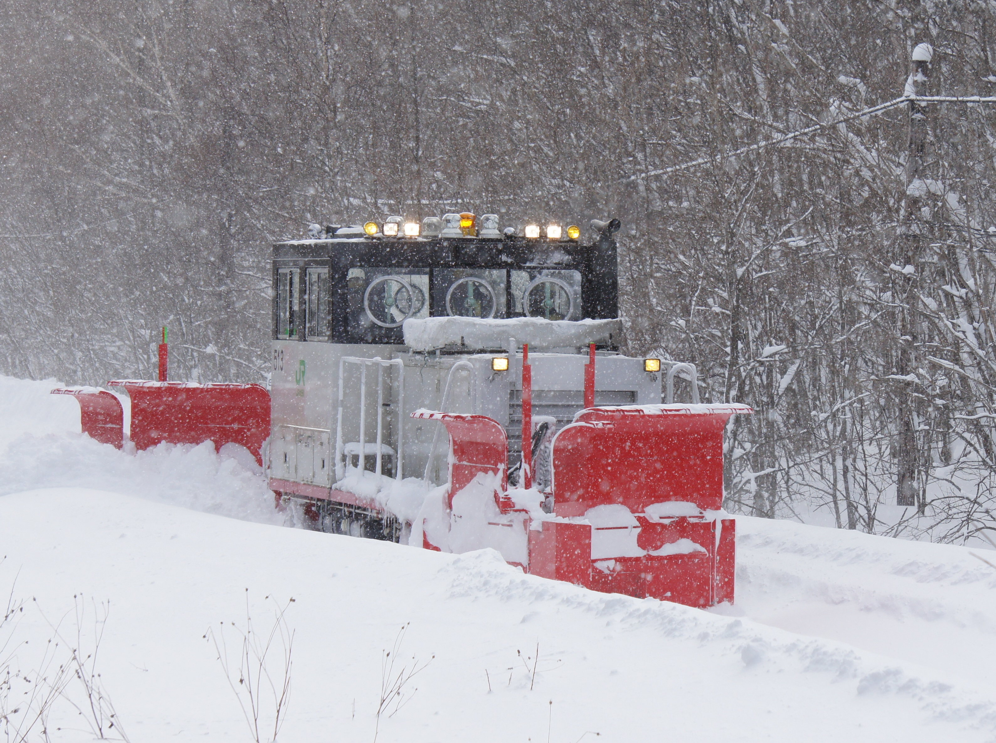 新潟トランシス製造のJR北海道モーターカーTMC500ASです